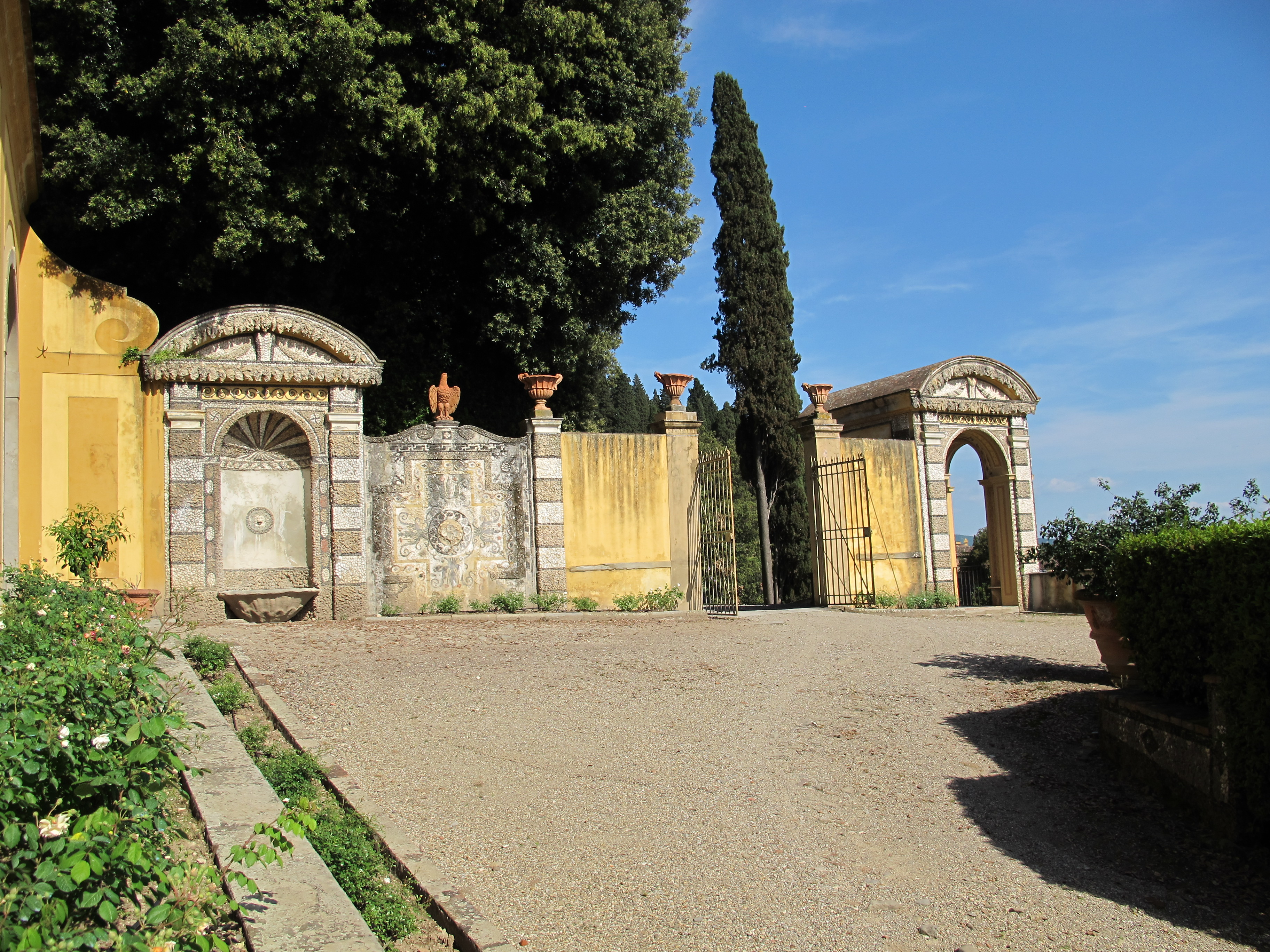 Villa medici di belcanto, ingresso 04.1